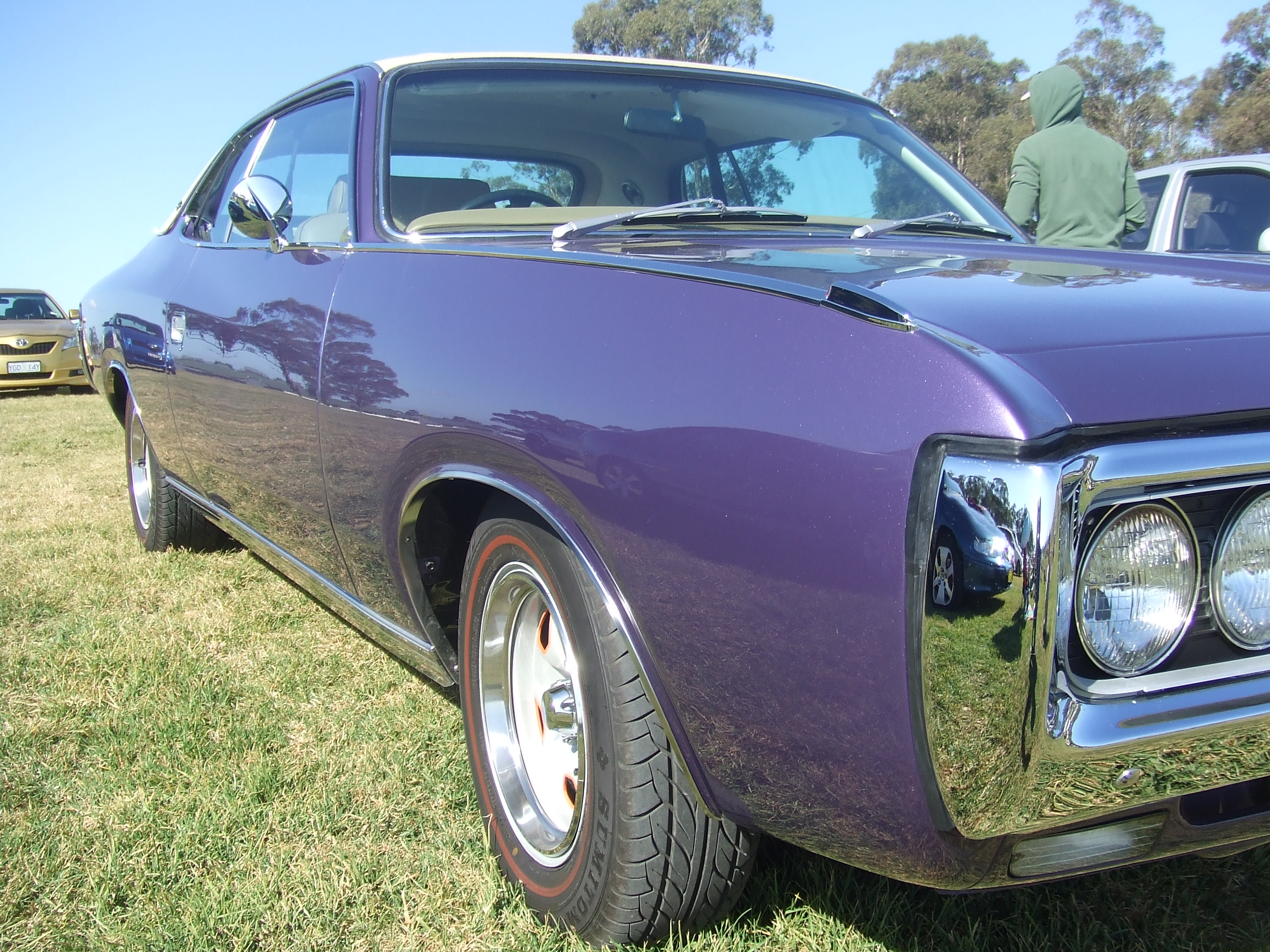 Chrysler by Chrysler CH